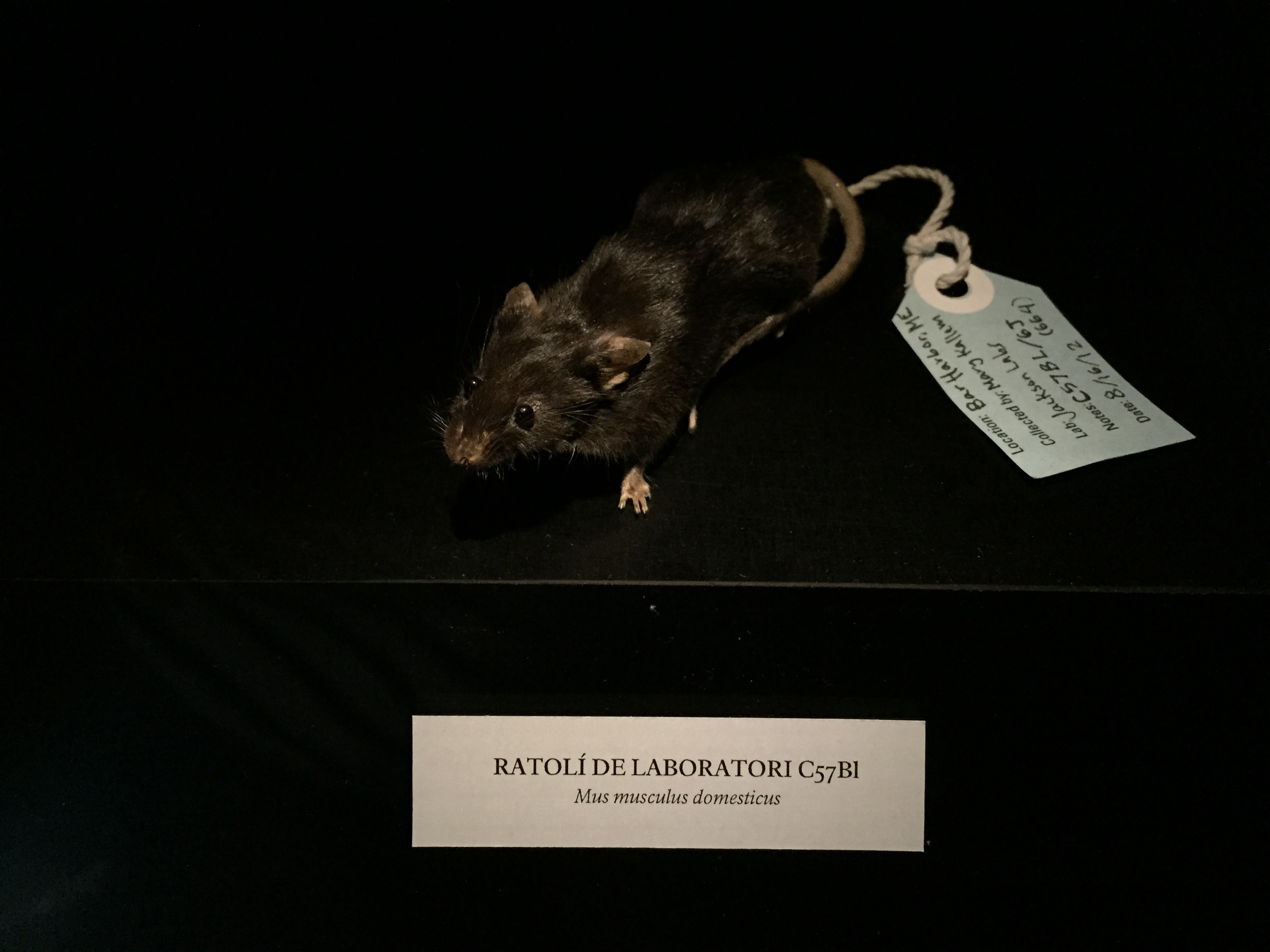 +Humans, exposició que va tenir lloc la tardor de 2015 al Centre de Cultura Contemporània de Barcelona